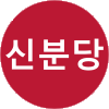 علامت خط مترو در شهر سئول، جمهوری کره